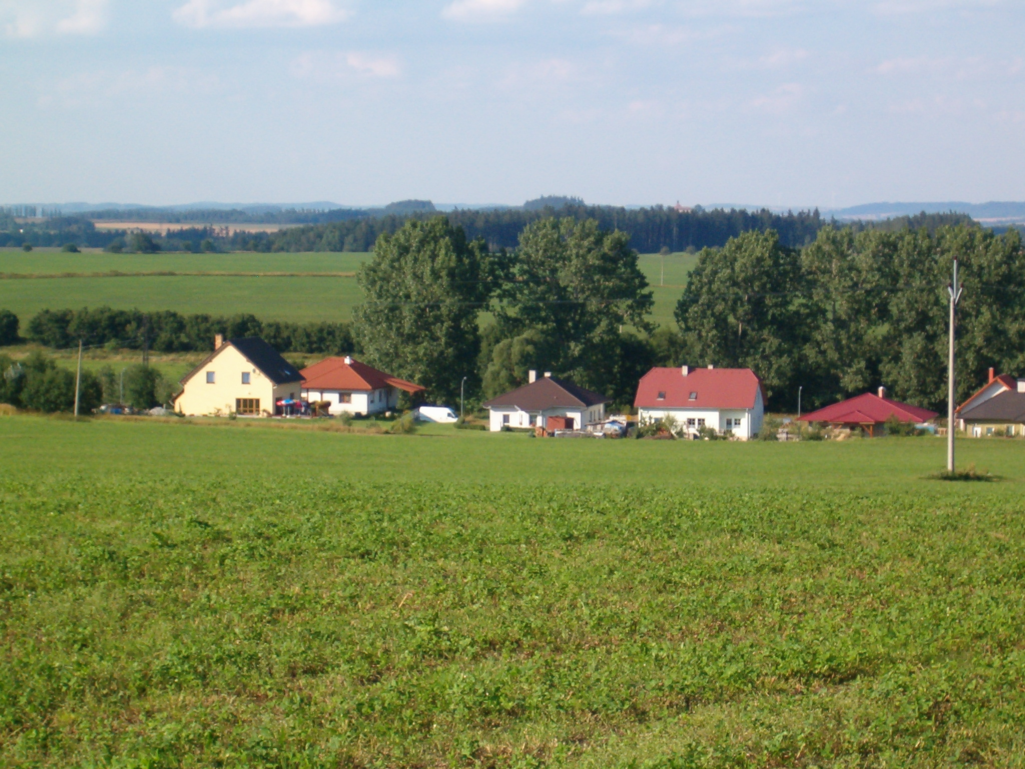 Peč - vesnice